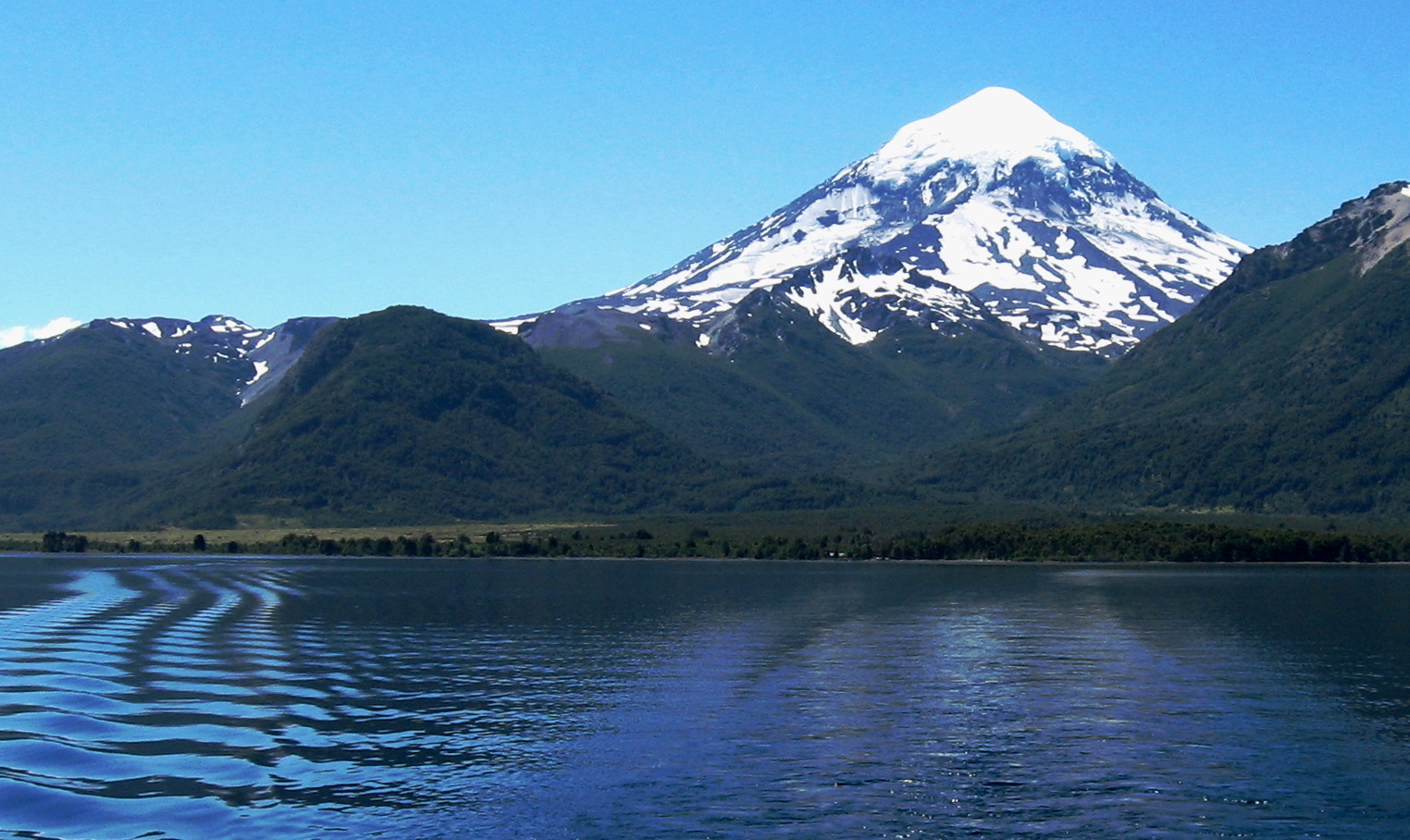 Volcán Lanín visto desde el lago Huechulafquén